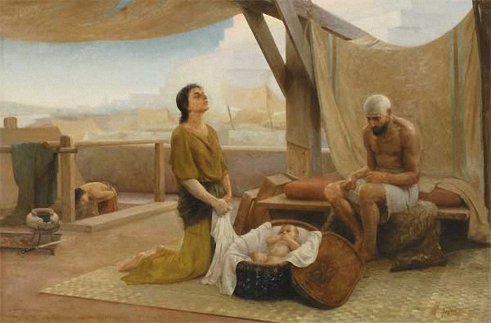 Исаак Аскназий Родители Моисея. 1891 г. ГРМ